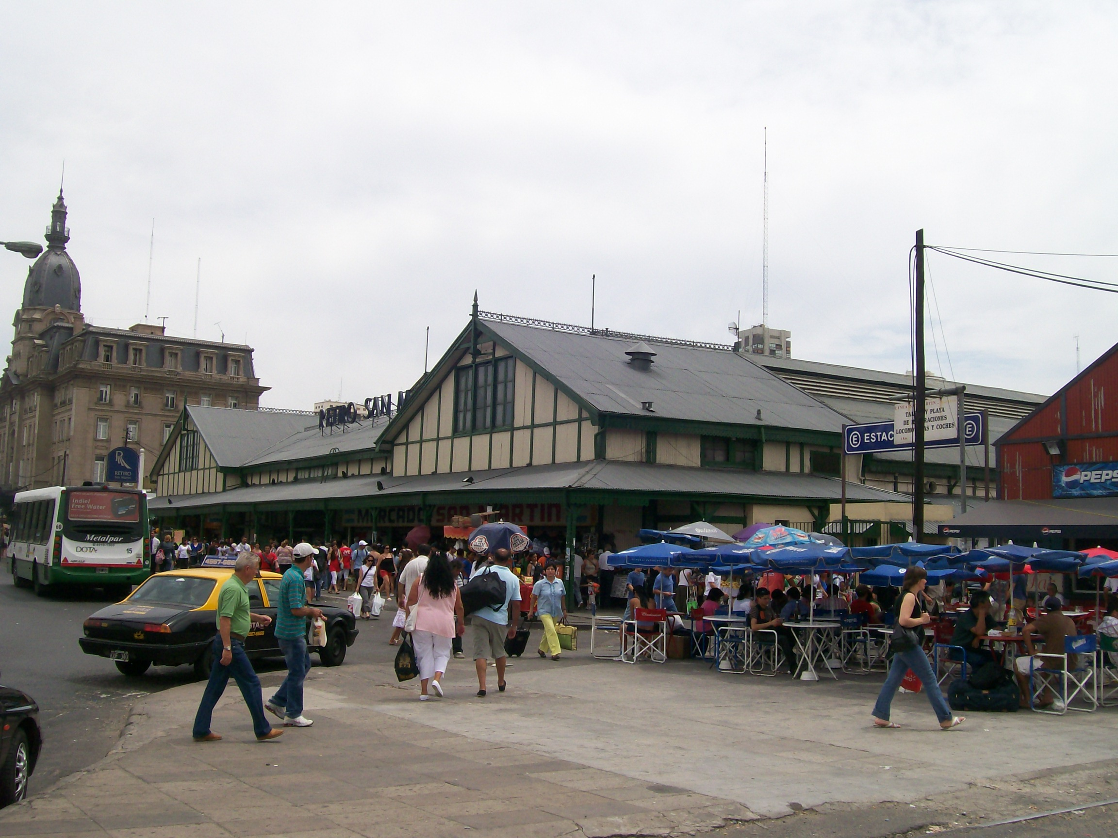 Estación Retiro del FFCC. San Martín